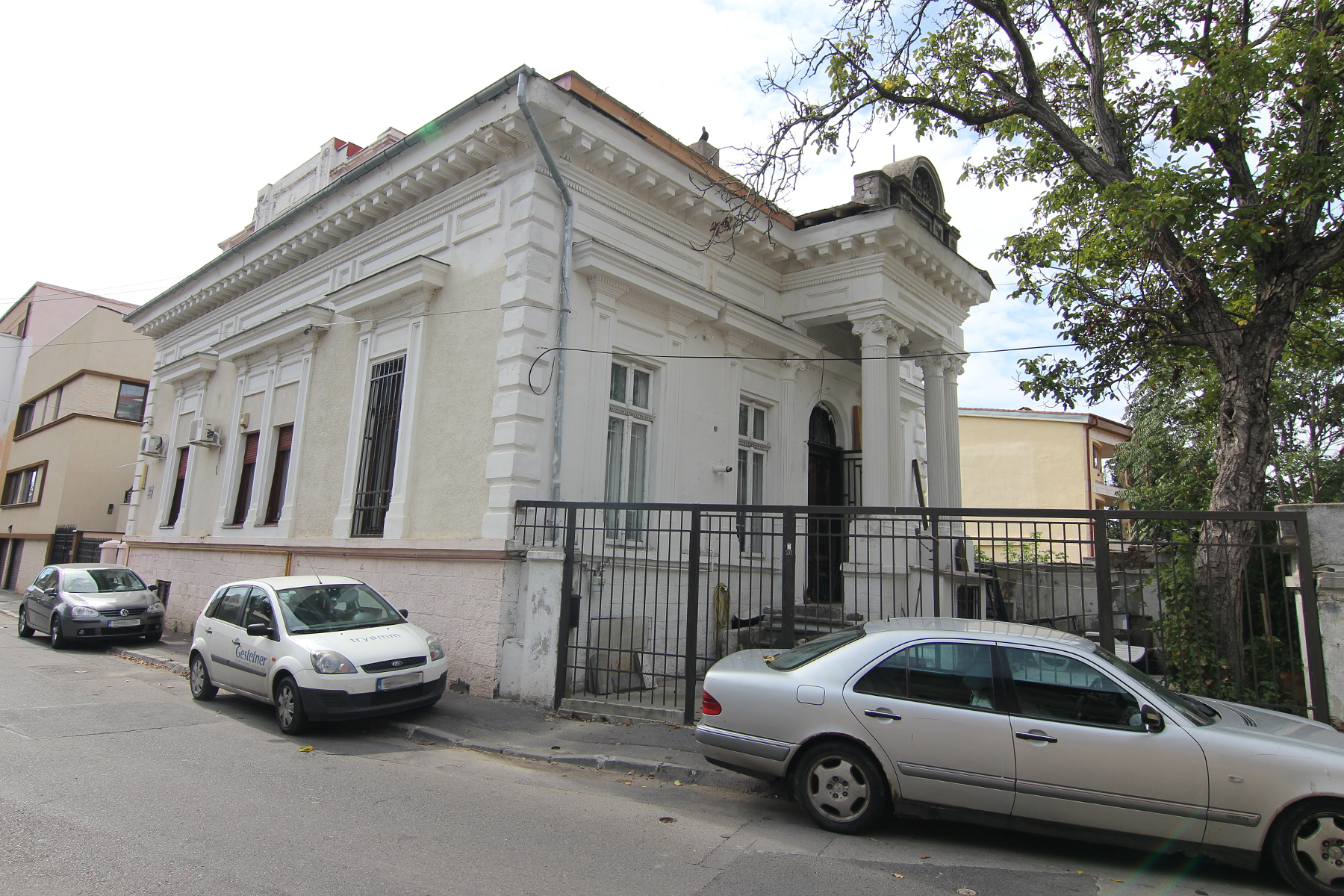 Casă pe Str Romulus